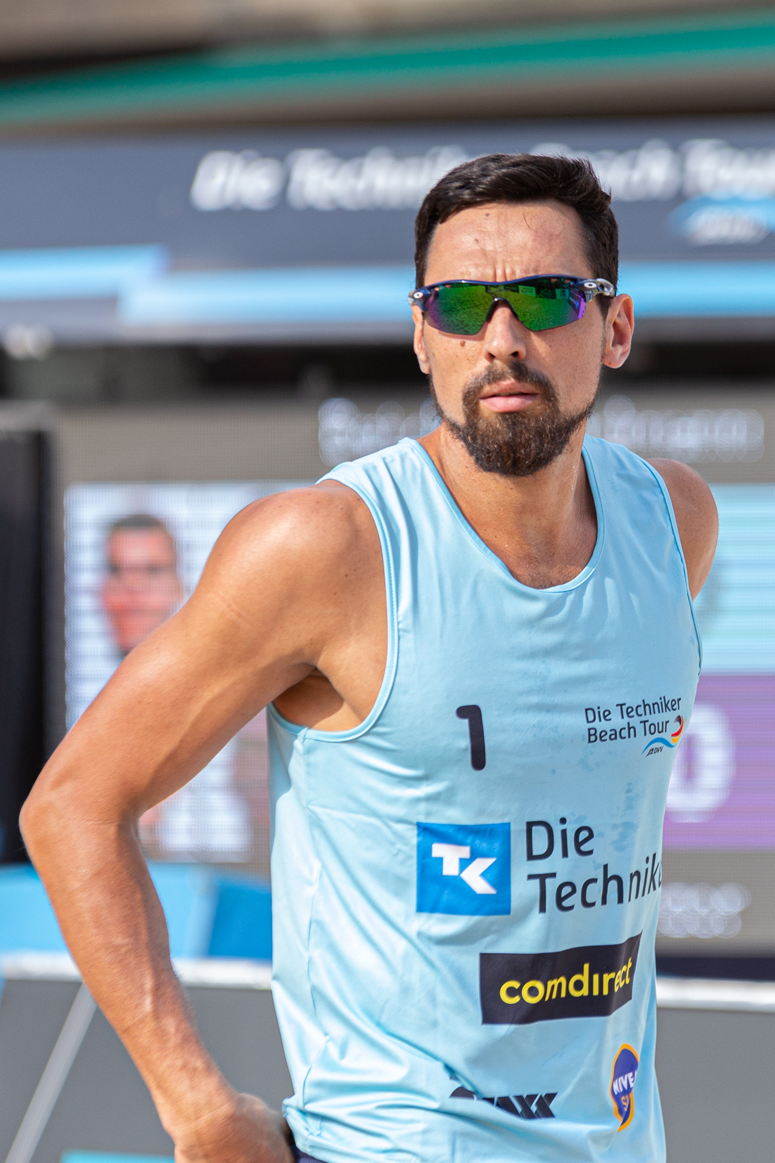 BeachVolleyball, Die Techniker beach tour Nürnberg; Jonathan Erdmann (VCO Berlin); Porträt, Einzelbild